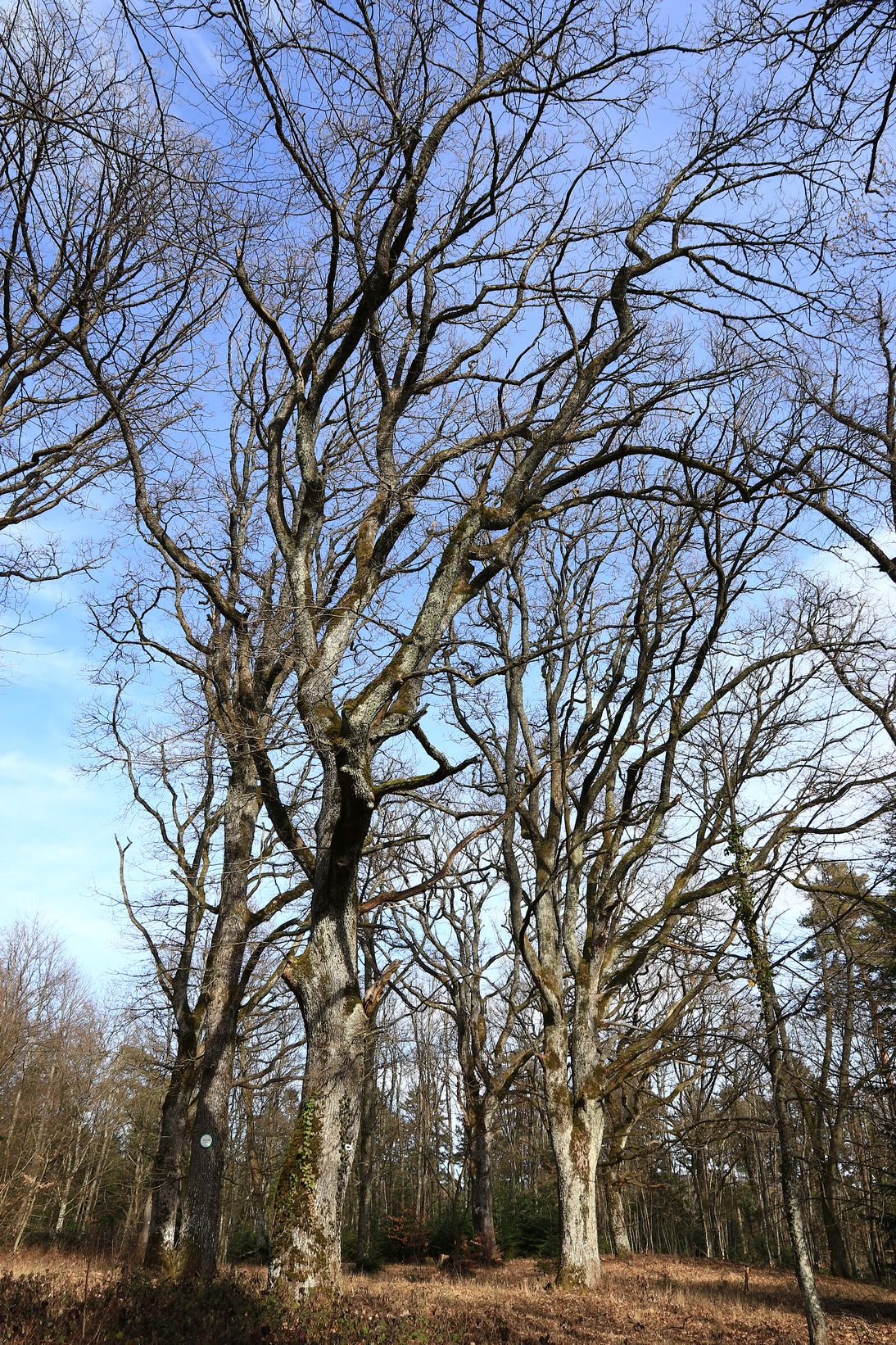 La clairière est sur notre droite, en montant le sentier.